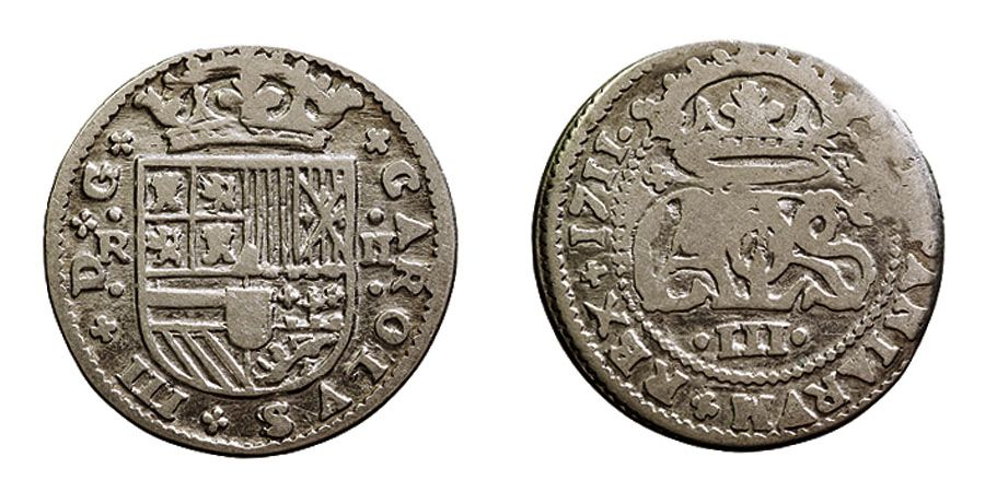 Moneda de dos rals encunyada a Barcelona el 1711 por l'Arxiduc Carles d'Àustria com pretendent al tron de la Monarquia Hispànica. Feta en plata.